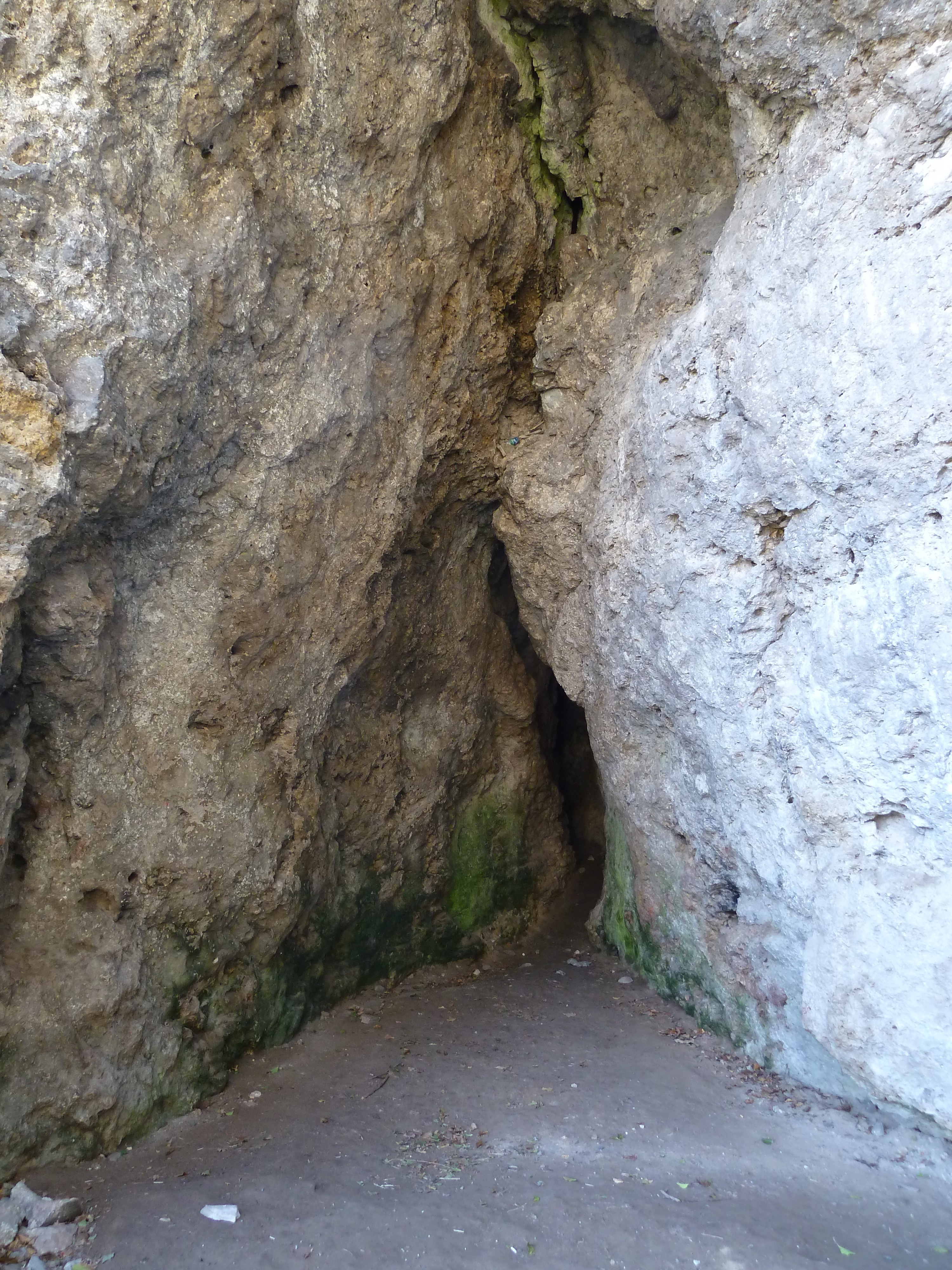 Die sich schnell verjüngende Südhöhle der Ilsenhöhle in Ranis